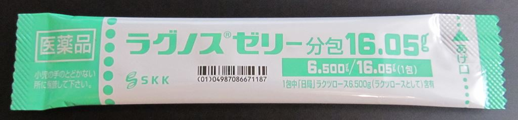 ラグノスゼリー分包16.05g 一般名：ラクツロース (Lactulose)